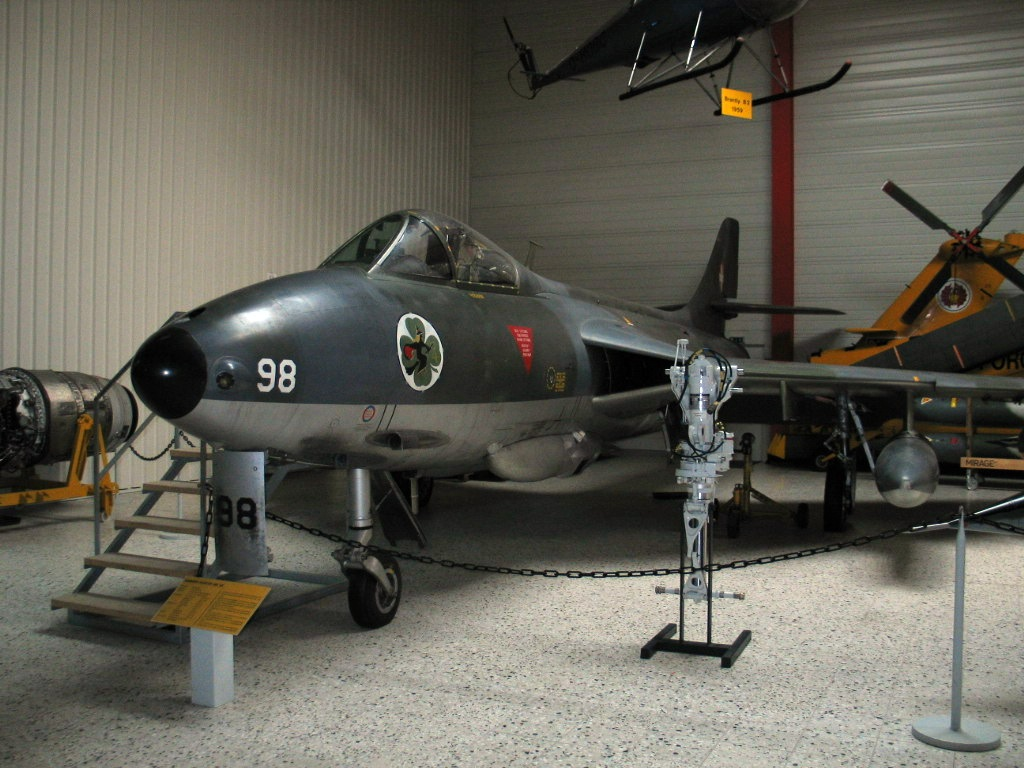 Hawker Hunter MK 58 - eigen foto